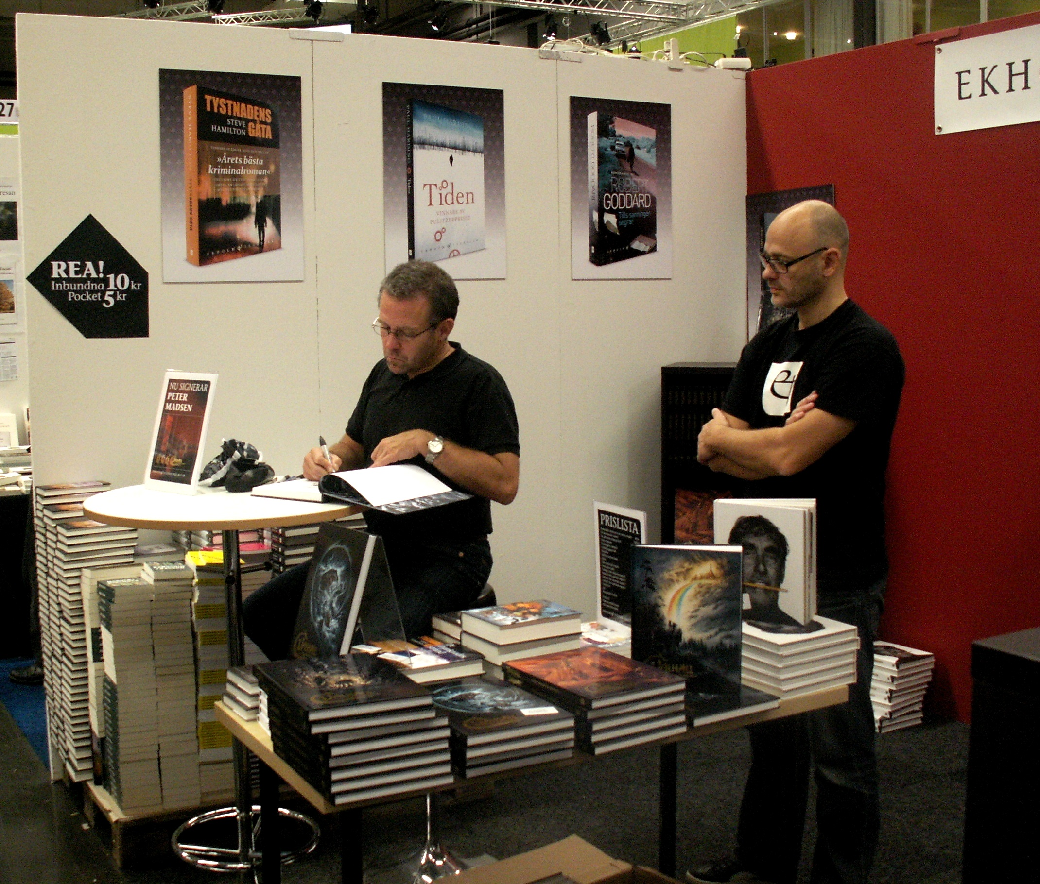 I förlaget Ekholm & Tegebjers monter (på Bokmässan i Göteborg 2012) dedicerar Peter Madsen en samlingsbok i albumserien Valhall. Förläggaren Kenneth Ekholm tittar på.